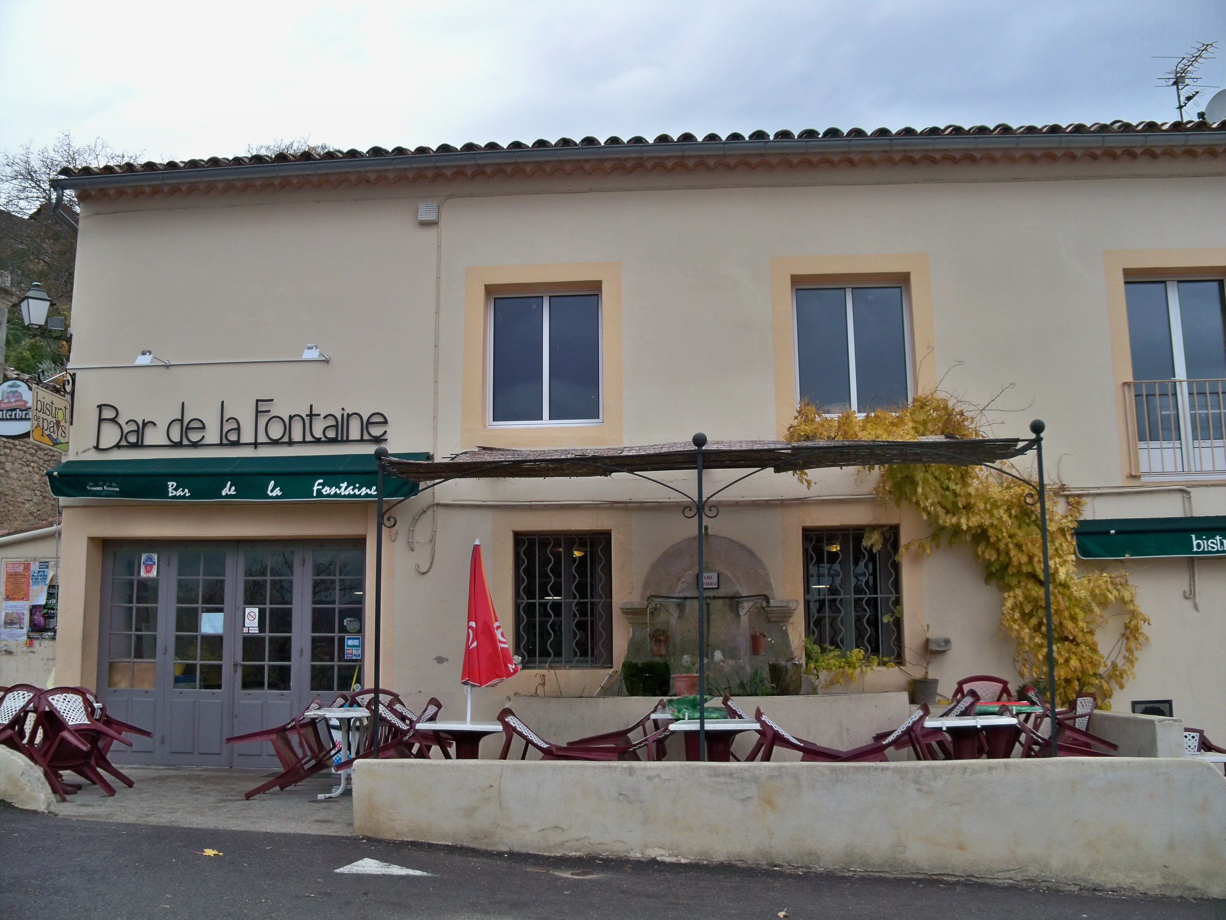 Bistrot de Pays de Saint Martin de Castillon, Vaucluse, France